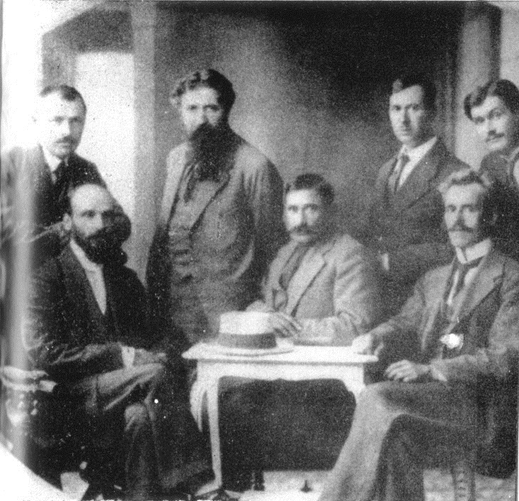 Дейци на НФП (българска секция)